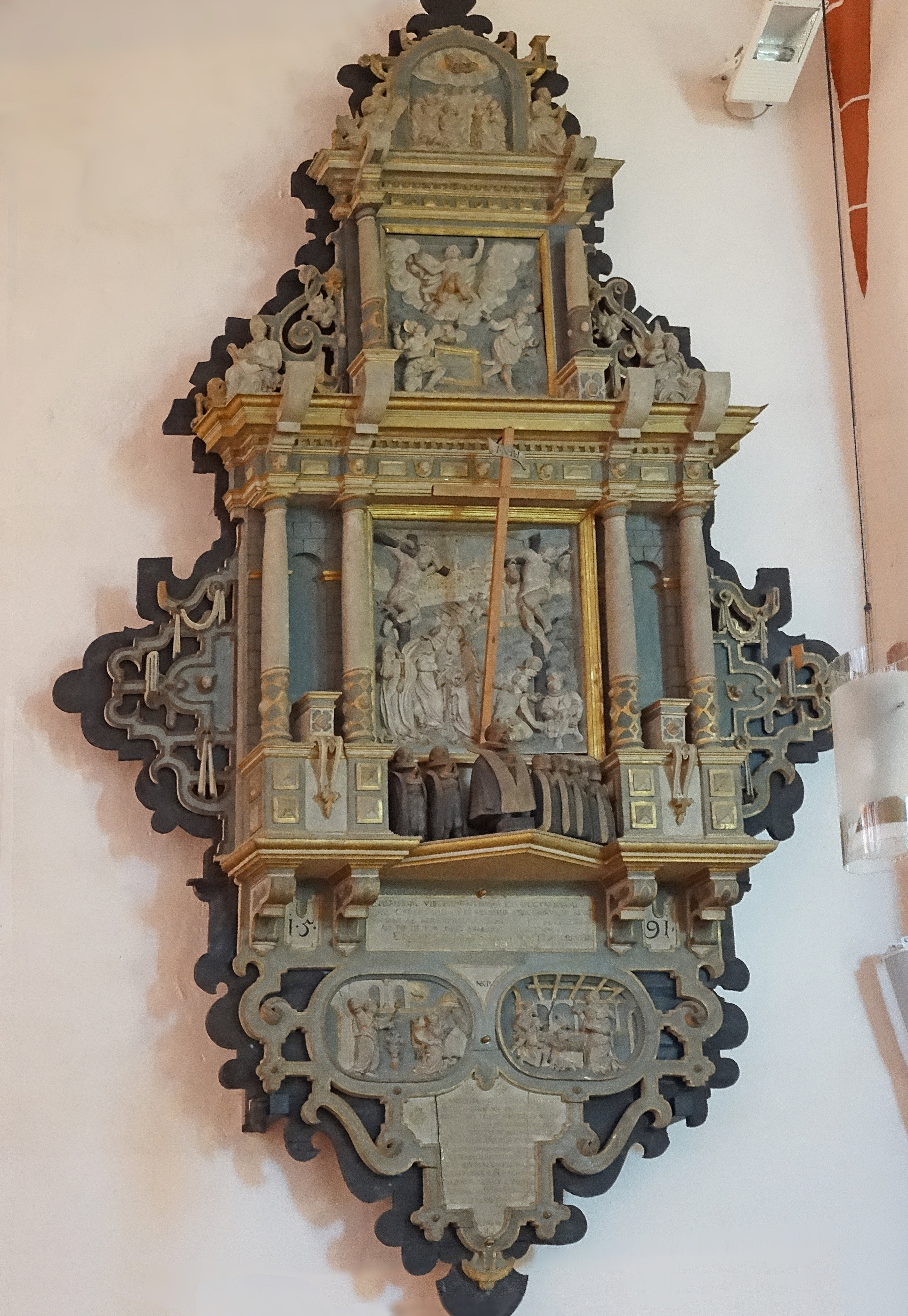 Renaissance-Epitaph für Cyriakus Ernst (1585) in der Stadtpfarrkirche St. Blasii (Nordhausen)